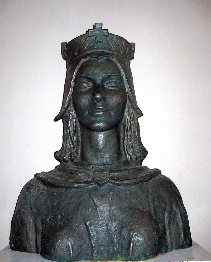 Jelena Slavna, hrvatska kraljica, žena kralja Mihajla Krešimira II., Solin, Croatia